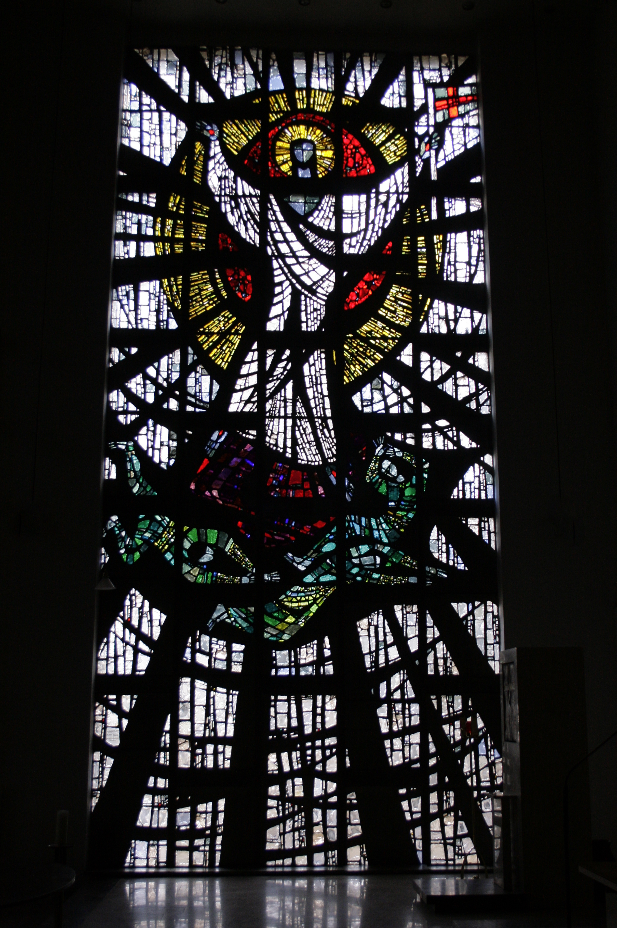 Gratz Wetzelsdorf Christkönigskirche Innenansicht